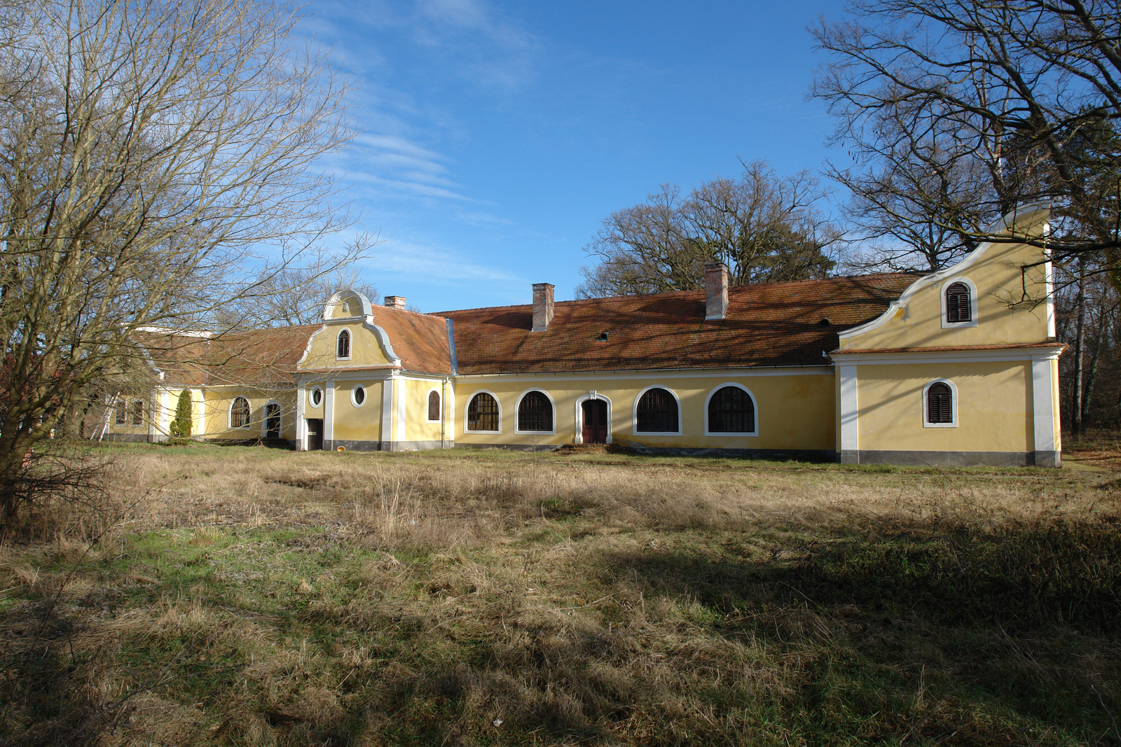 v. Pongrácz-kúria (Csombárd, Petőfi Sándor Sándor utca 14.) This is a photo of a monument in Hungary. Identifier: 7852